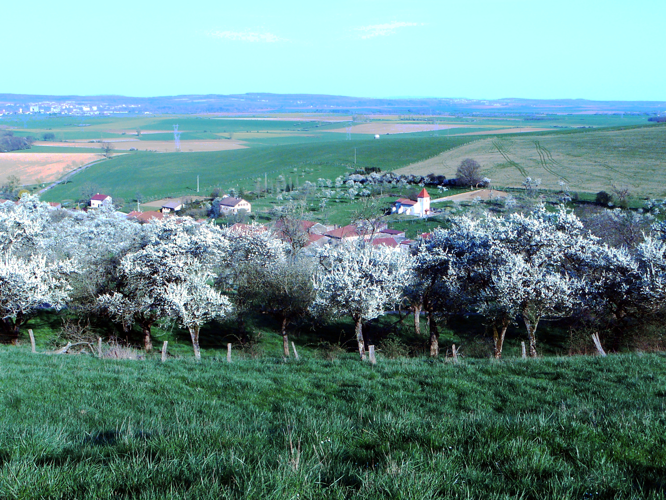 vue de marthemont avec mirabellier en fleur